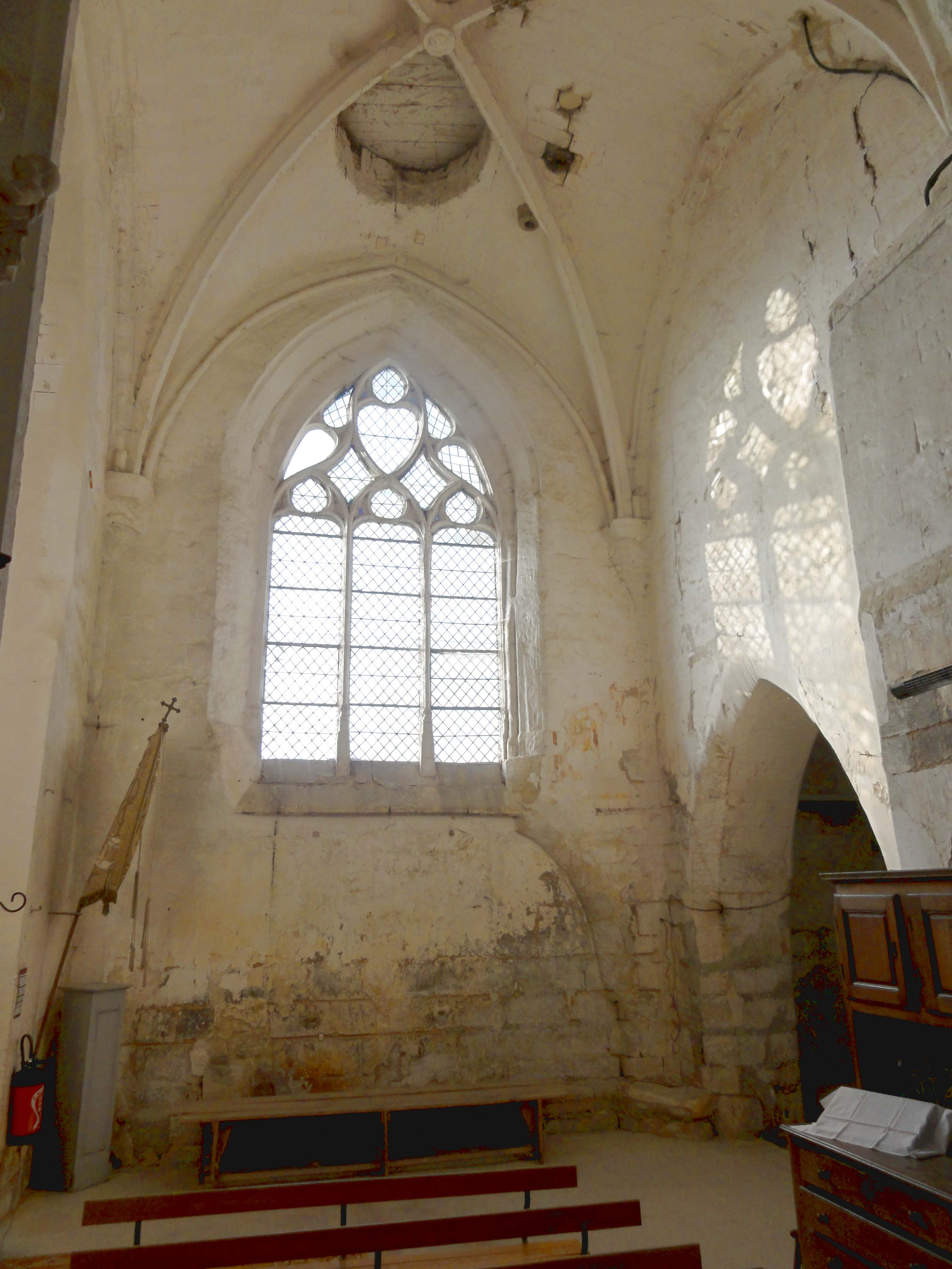 Intérieur de l'église - voir titre.